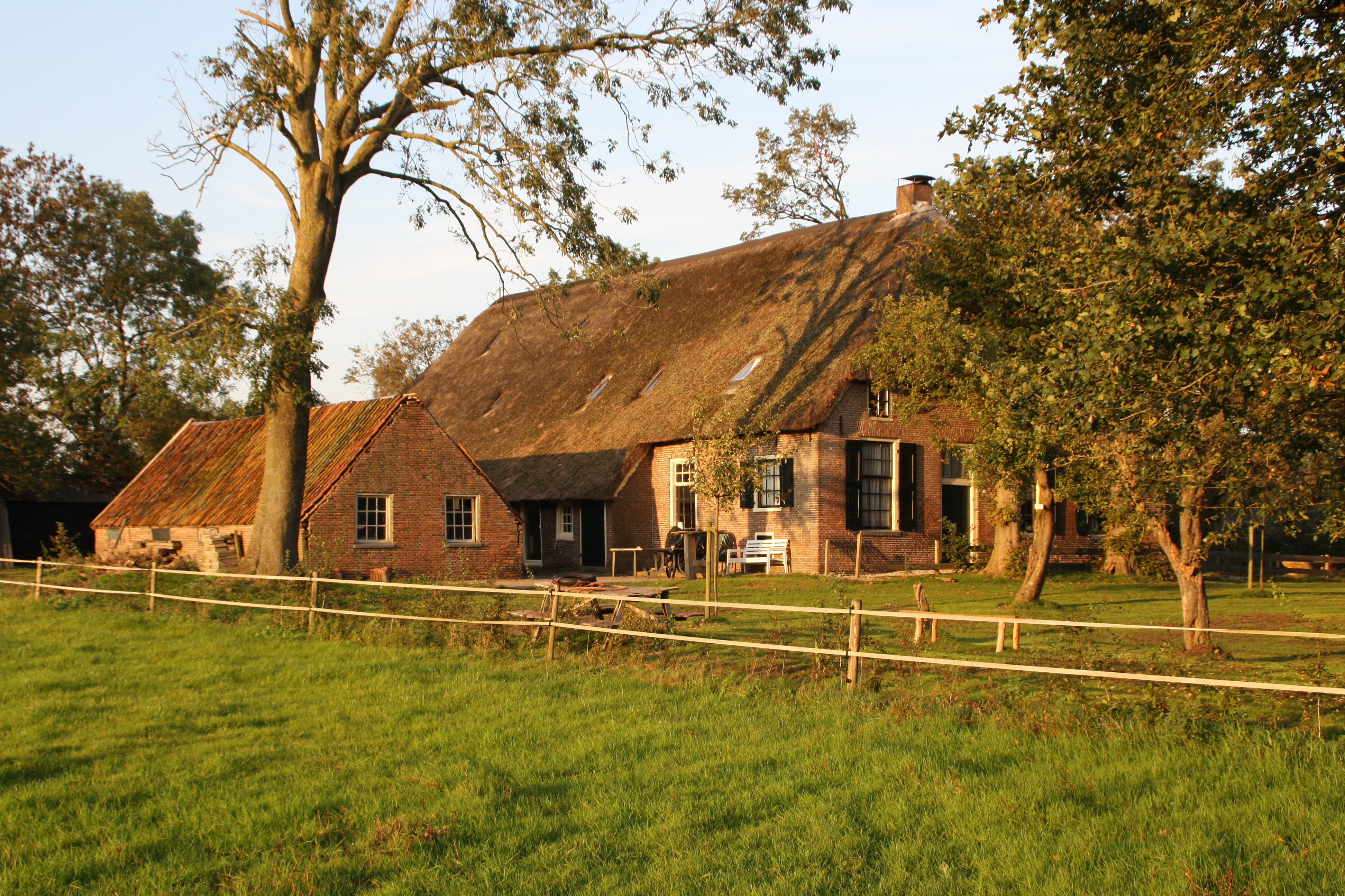 Varkensschuur met stookhok van boerderijcomplex Dwingelerweg 9 Ansen Rijksmonument nr: 526894 Omschrijving Varkensschuur met stookhok (1933) op rechthoekige plattegrond, opgetrokken uit baksteen en gedekt door een met rode Hollandse pannen belegd zadeldak tussen topgevels. Geschulpte windveren; topschoorsteen met bord. In de zuidgevel twee (hergebruikte) meerruitsvensters; in de overige gevels deuren en liggende stalvensters (sommige met luiken); de toegangsdeuren aan westzijde terugliggend.